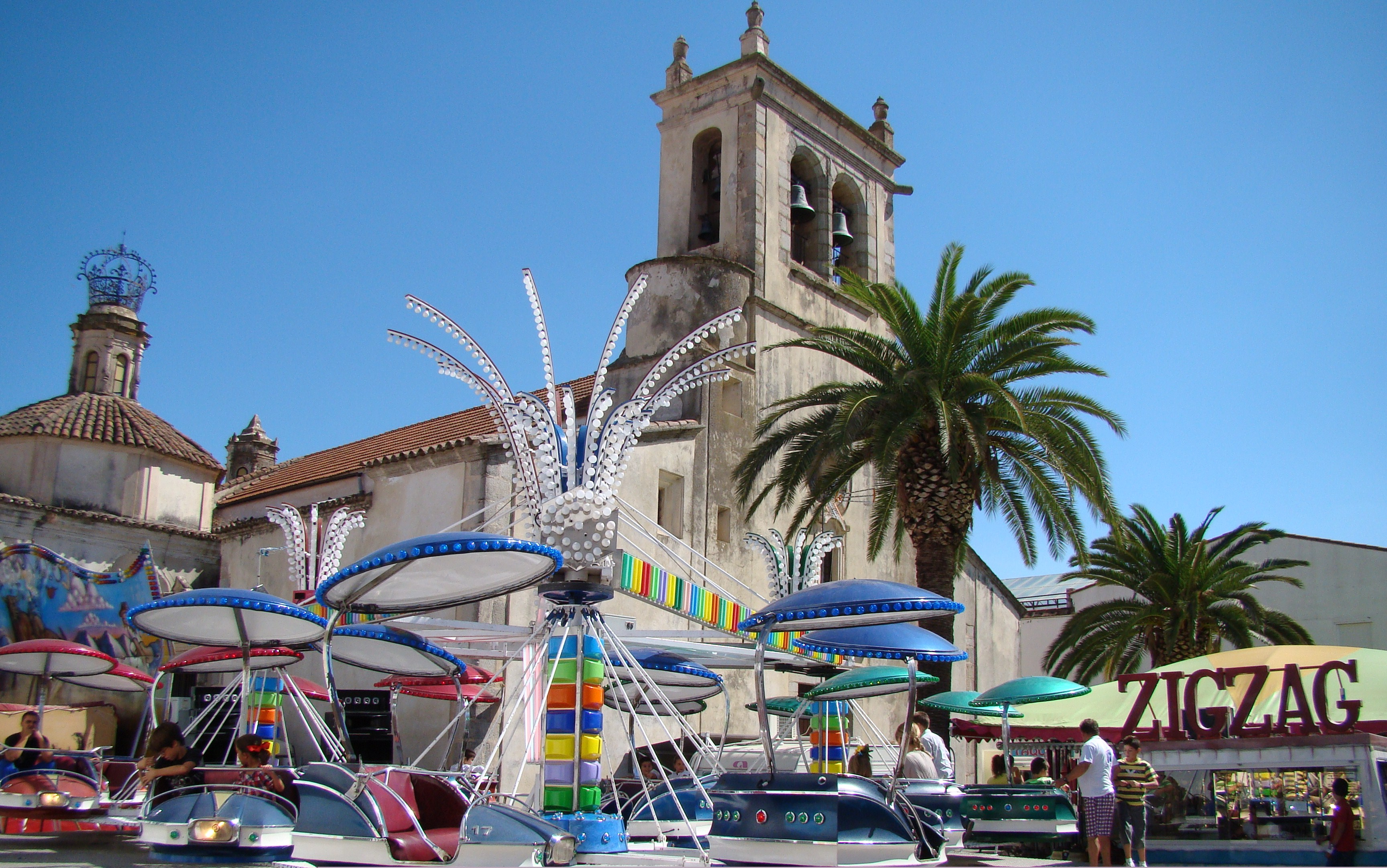 Atracciones de la Feria en el llano de Santa Catalina, Fregenal de la Sierra